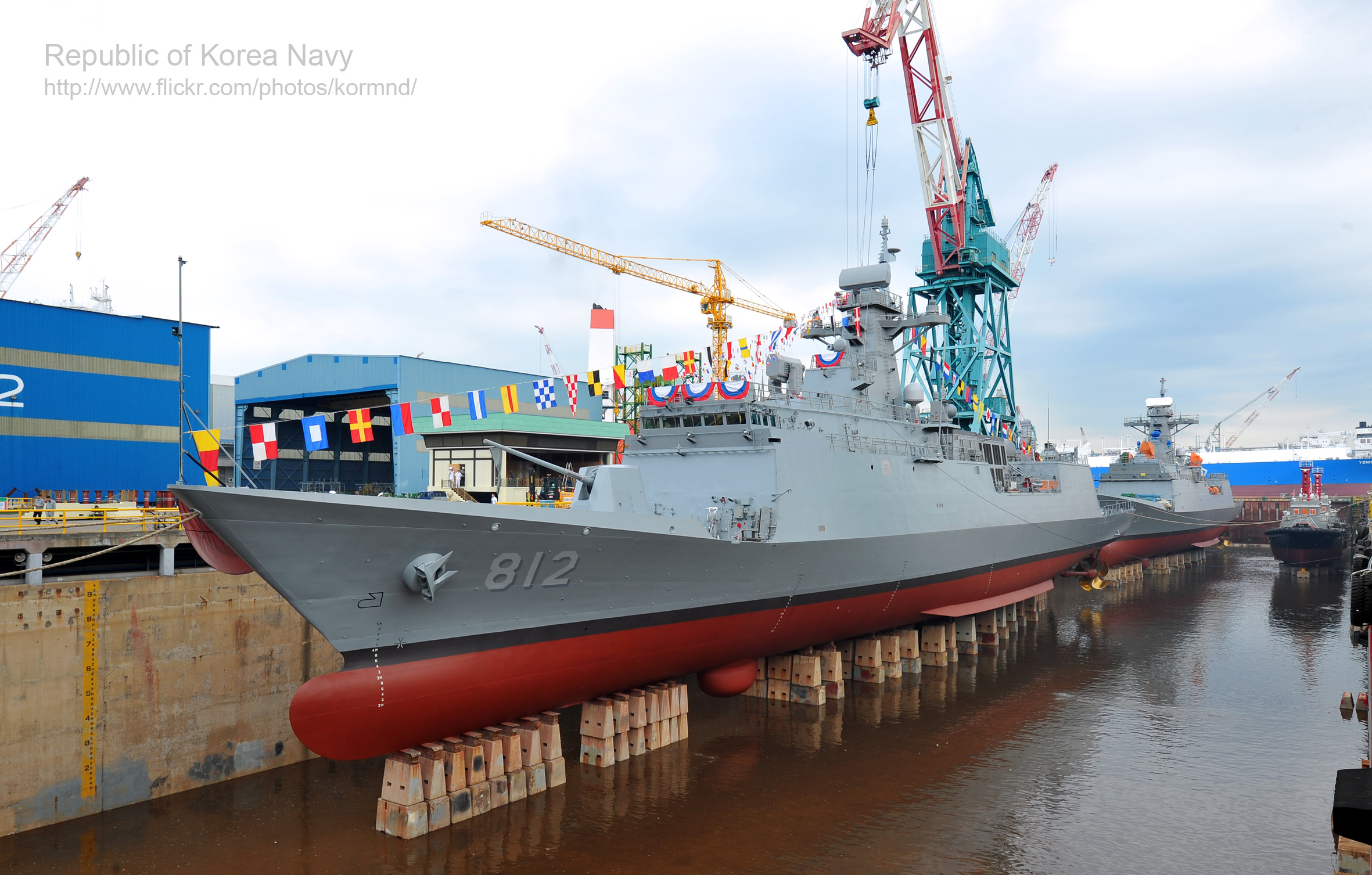 '13. 7.18. 두 번째 차기호위함인 경기함 진수식이 울산 현대중공업 조선소에서 거행되었다 촬영자 : 강진욱